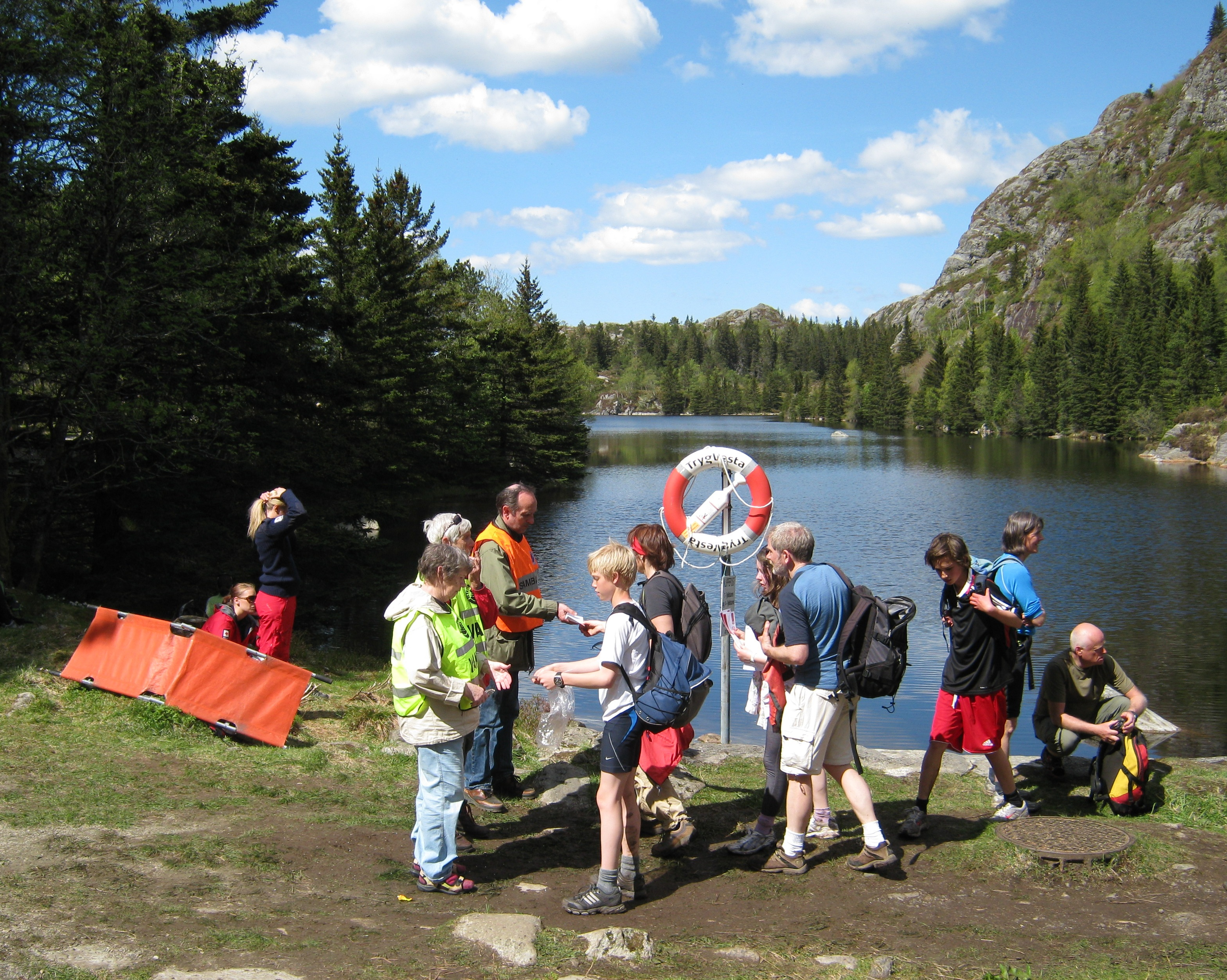 Klipping av deltakerkort på Sandviksfjellet under Syvfjellsturen i Bergen 2010